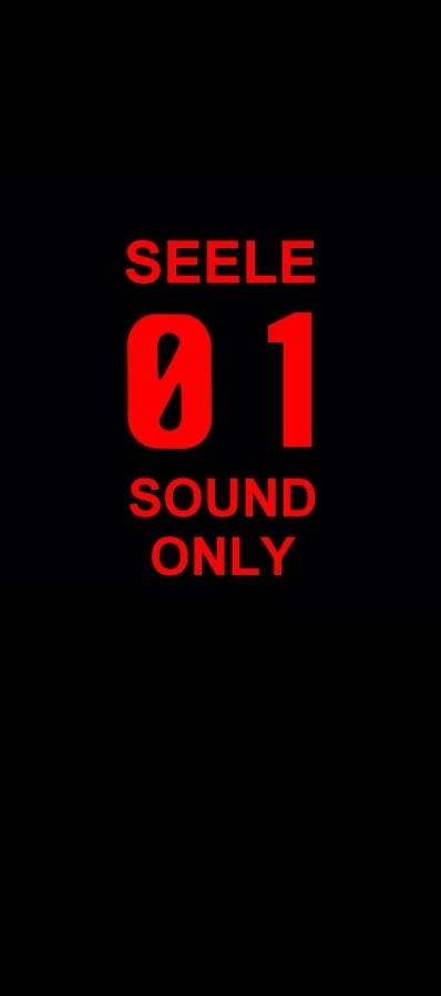 Riproduzione del monolite di Lorenz Keel di Neon Genesis Evangelion